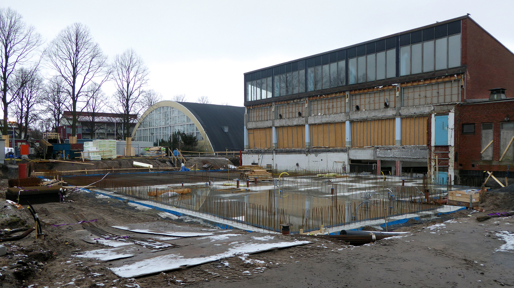 Tillbyggnad och ombyggnad av Ystads gamla badhus krävde bygglov.